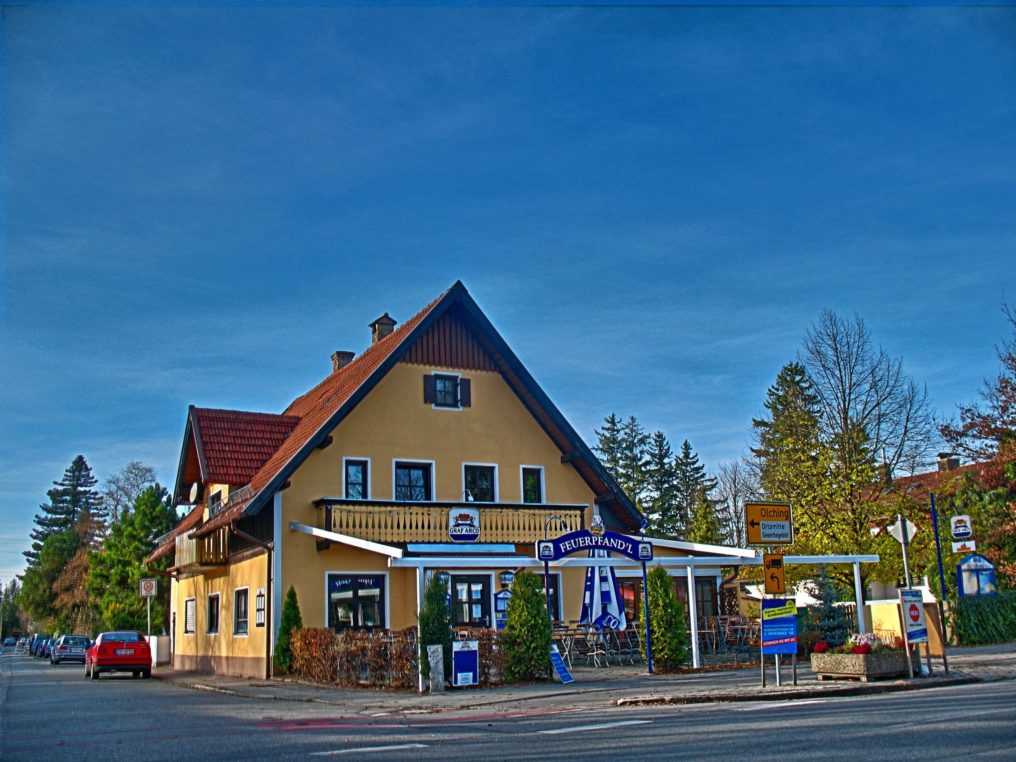 Germany, Bavaria, Gaststätte in Gröbenzell, einem Münchner Vorort